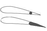 Закрылок Гоуджа. Схема